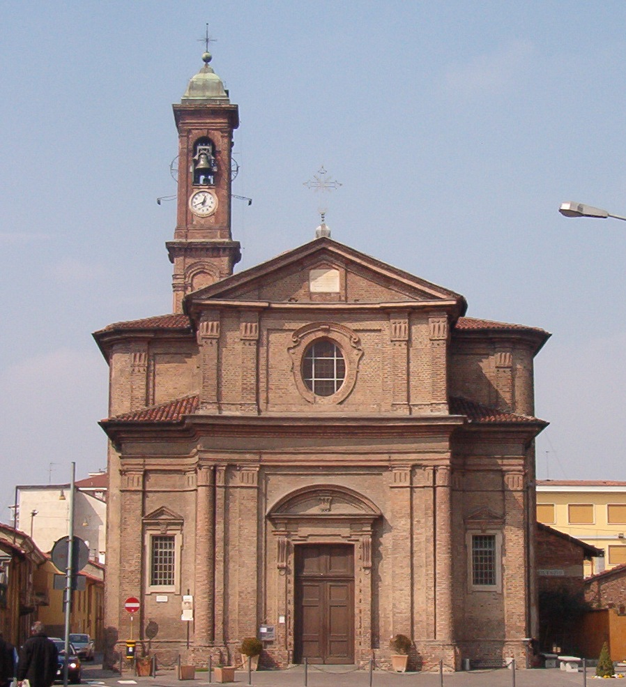 Chiesa parrocchiale SS. Trinità - Nichelino - provincia di Torino - Italia